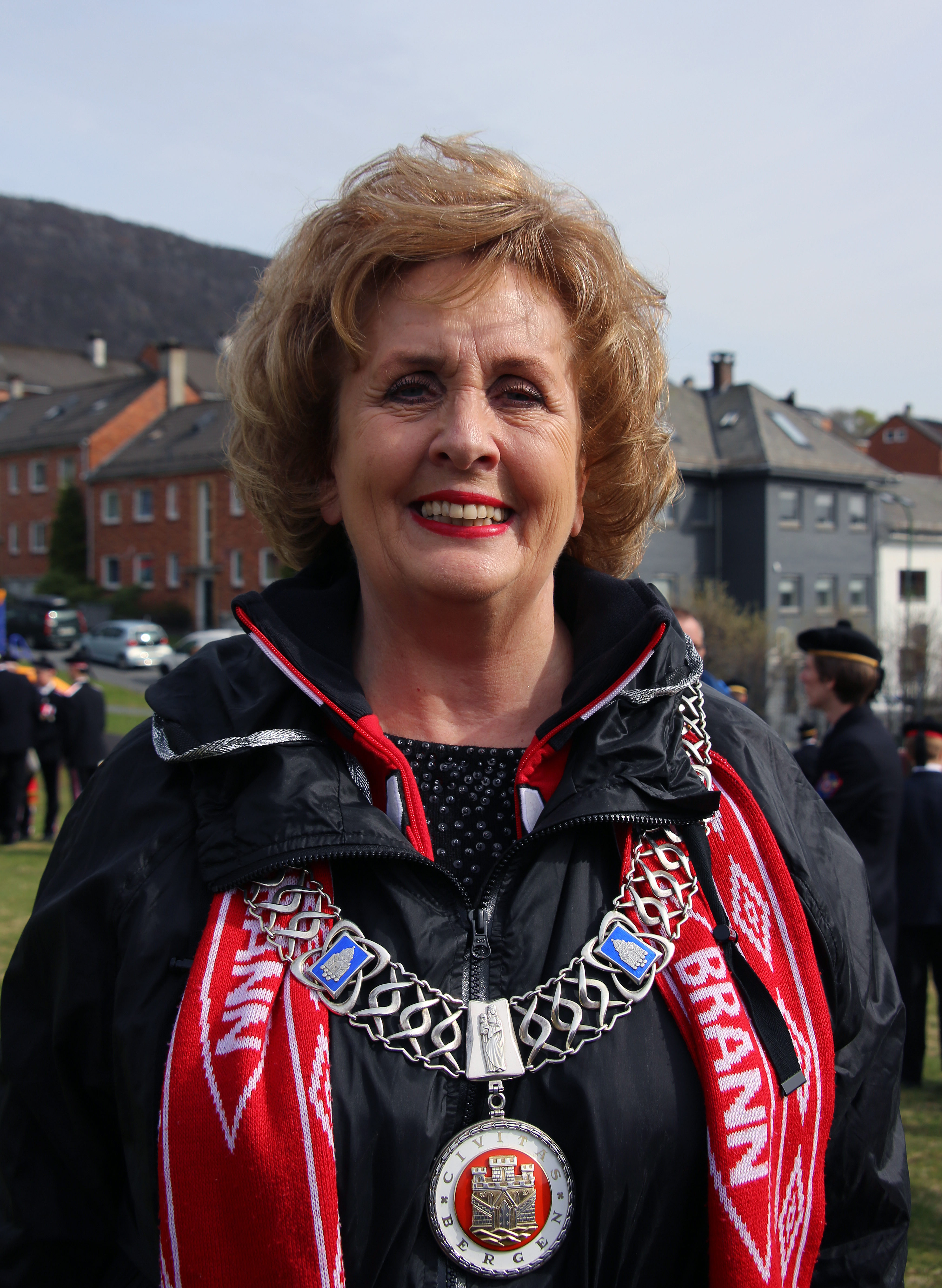 Trude Drevland